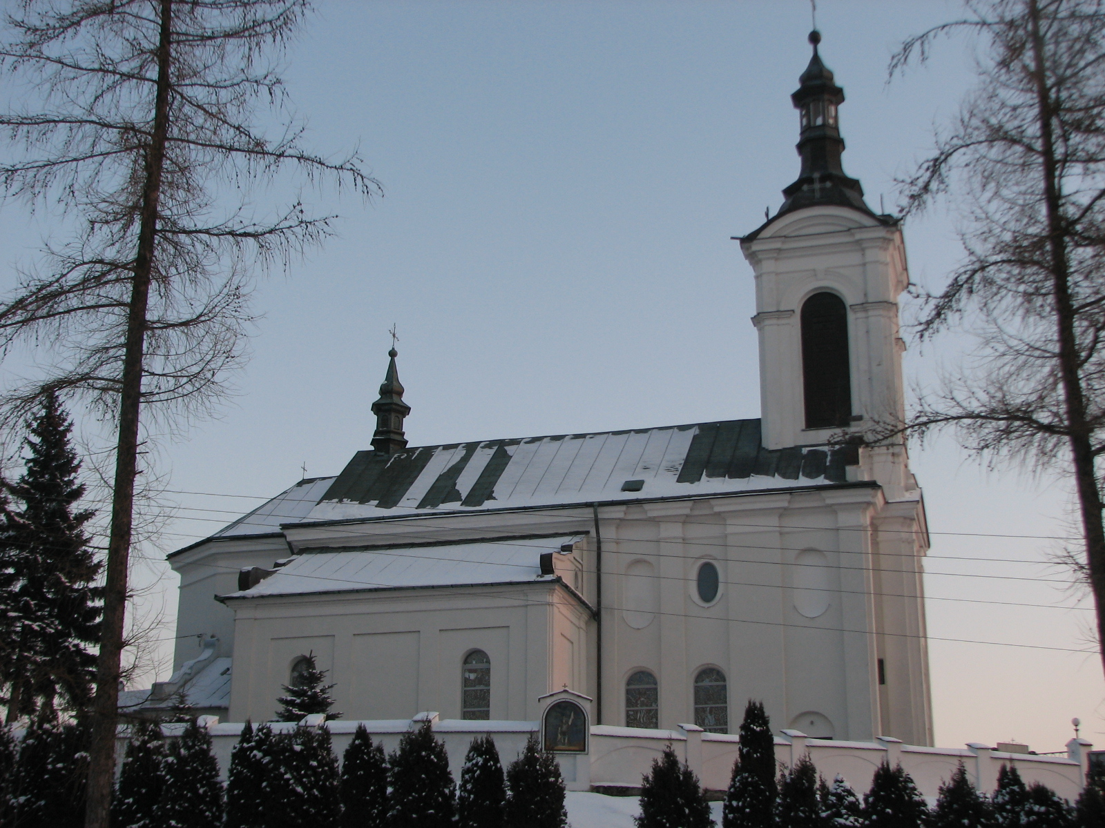 Racławówka Zabierzów 283 - kościół parafialny pw. Wszystkich Świętych Ogrodzenie z kapliczką i bramami (zabytek nr A-157 z 16.08.2006)